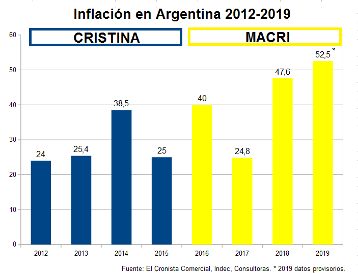 Argentina Tasa de inflación anual 2012-2019. Fuentes: El Cronista, "Cómo fue la ´ultima década de Artgentina en materia de inflació", 17/10/2018, Indec, El Economista, "Consultores remarcan sus proyecciones de inflación", 15/10/2019.